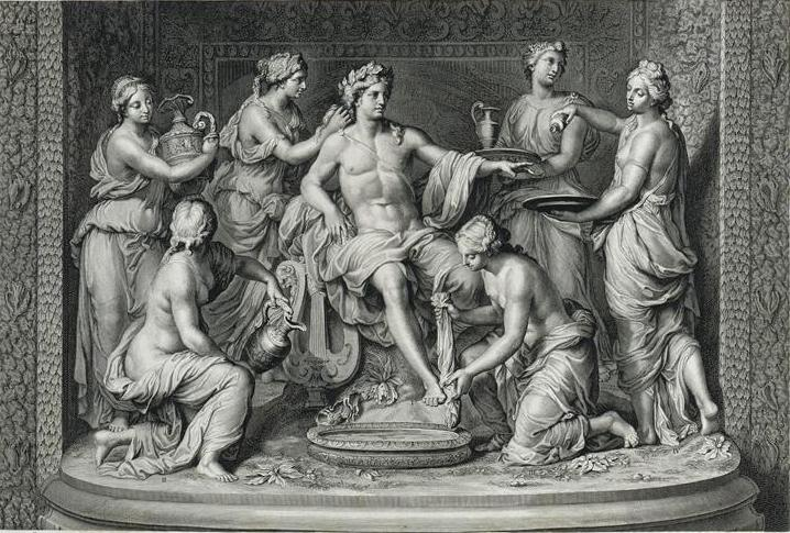 "Soleil descendant chez Thétis où six de ses nymphes sont occupées à le servir"